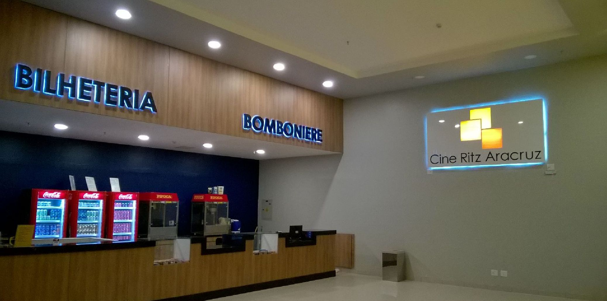 Bilheteria e bomboniere do Cine Ritz Aracruz